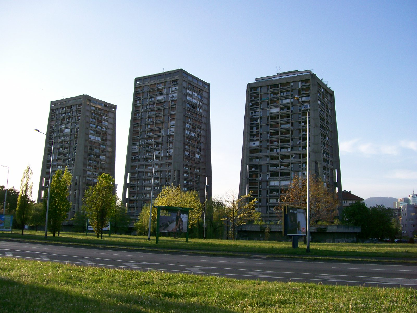 Richterovi neboderi u Slavonskoj aveniji, Zagreb, tzv. rakete.